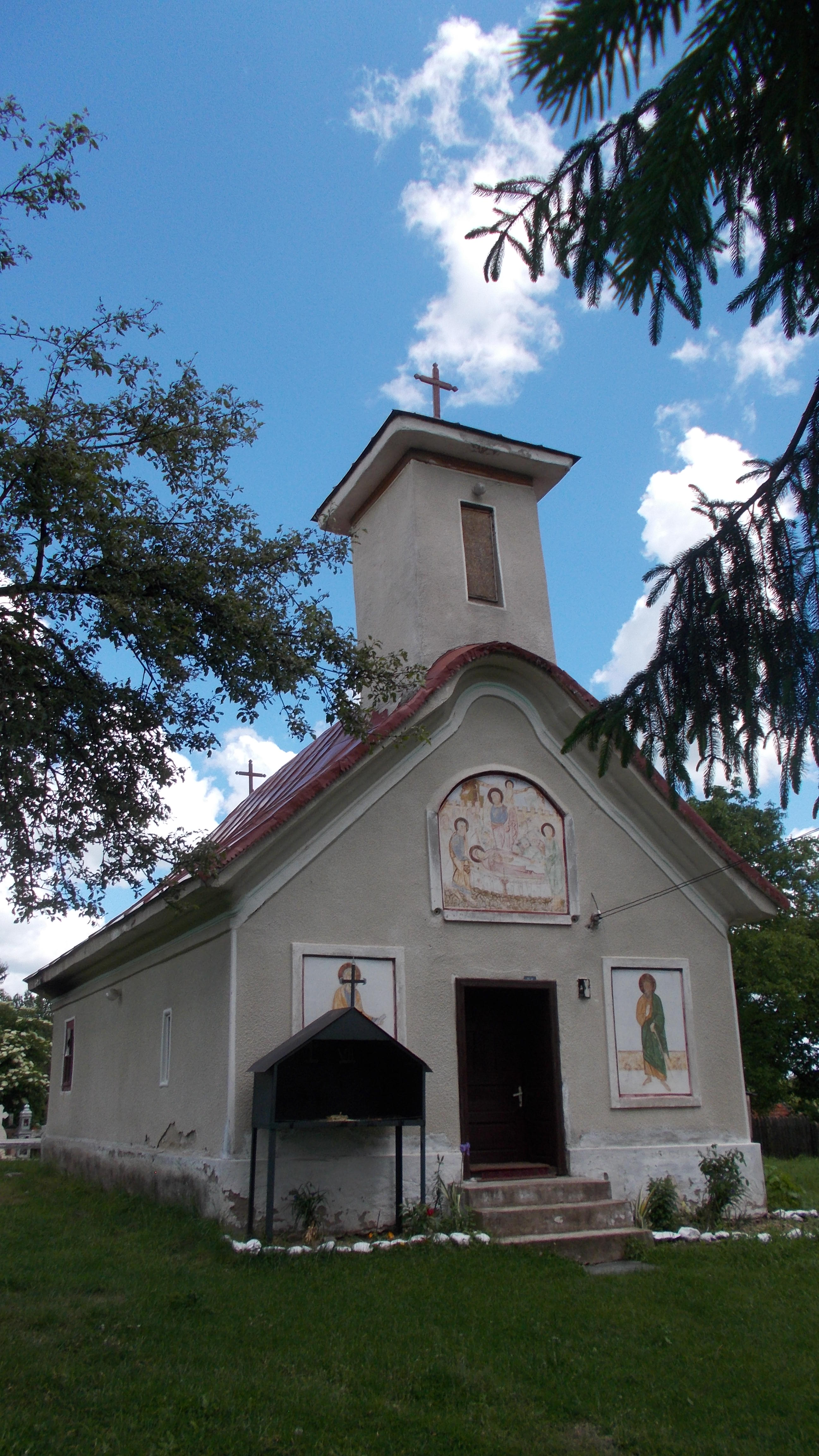 Biserica de lemn „Adormirea Maicii Domnului” din Prejna